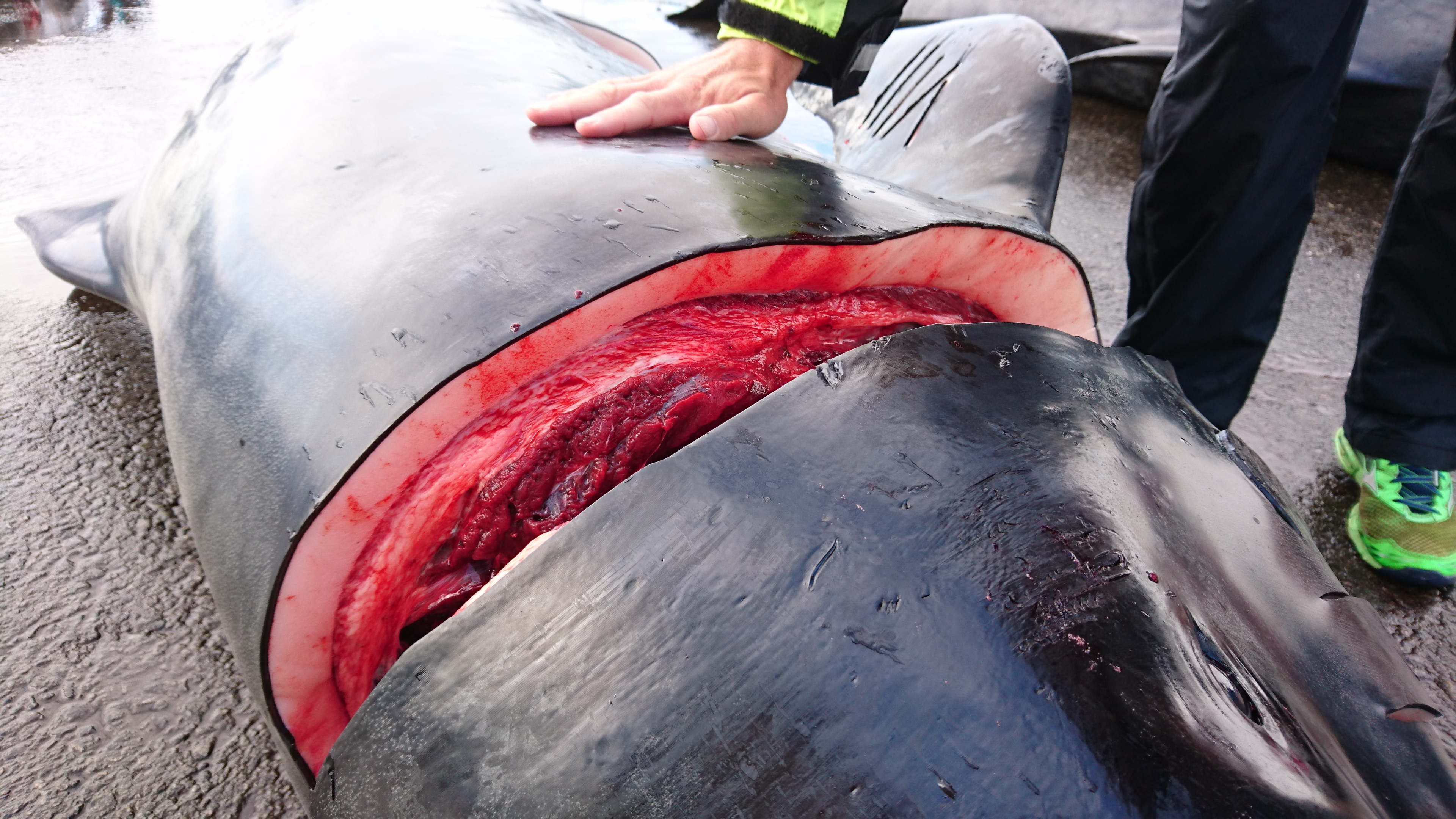 Aufgeschnittener Grindwal mit der klar erkennbaren Speckschicht. Aufgenommen im Hafen von Tórshavn am 24.7.2018 von Ingo Blaha